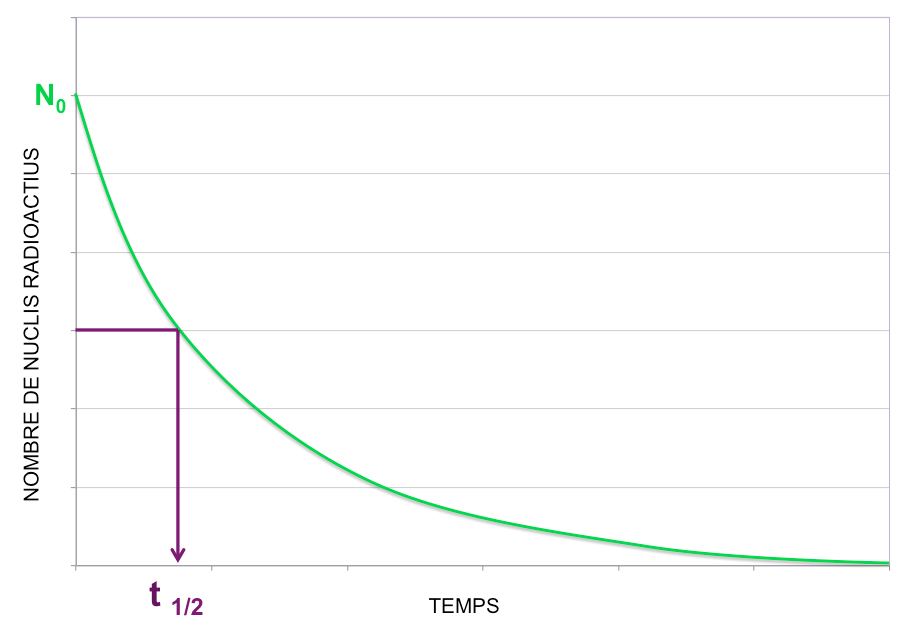 Gràfic de la vida mitjana en desintegracions.